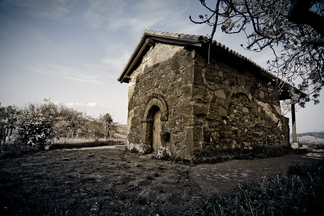 Abrisketako San Pedro ermita. XI. mendekoa, prerromanikoa.